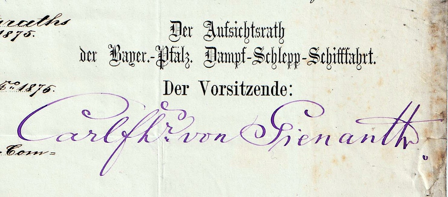 Carl von Gienanth (1818-1890), eigenhändige Unterschrift, 1876